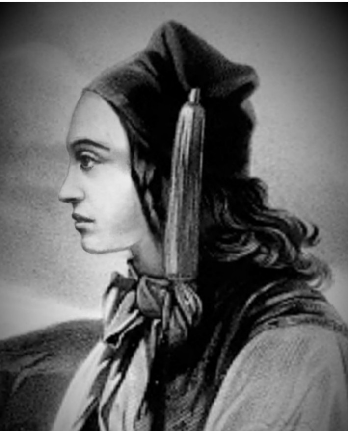 self-made picture